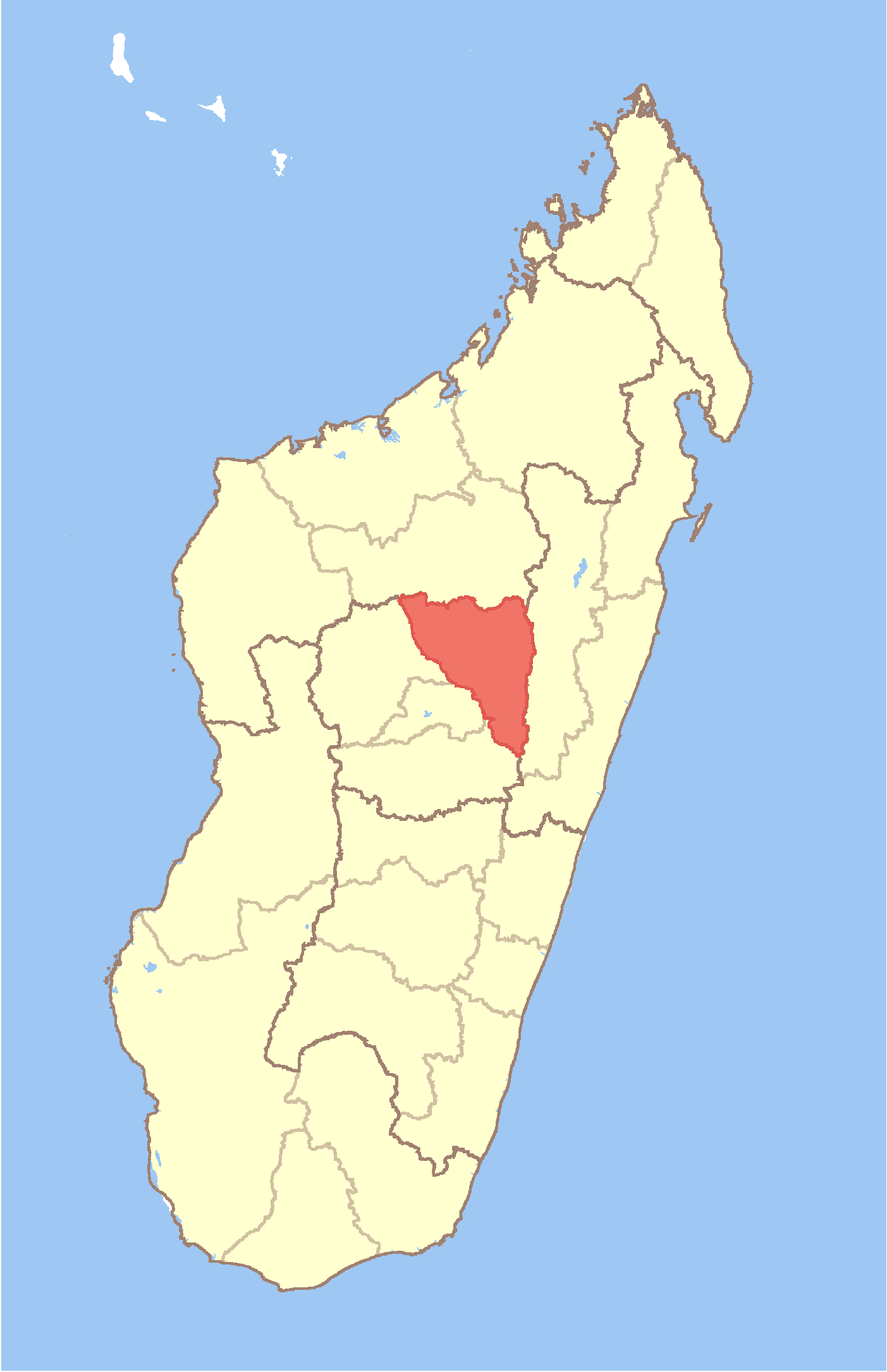 Map of Madagascar with Analamanga Region highlighted